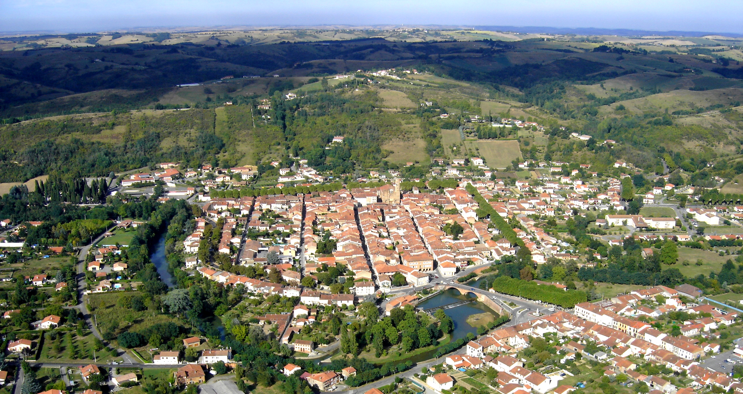 Plan d'ensemble de Montesquieu-Volvestre